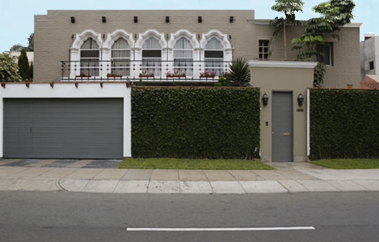 La Mansión de Pedro Pablo Kuczynski, calle choquehuanca Huaca Huallamarca. Distrito de San Isidro, Lima.